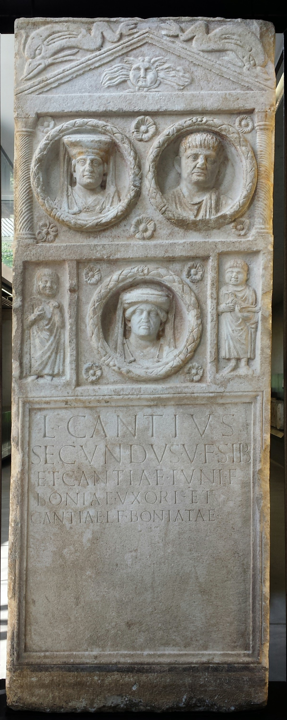 Detail der Grabstele des L. Cantius Secundus. Inschrift: L(ucius) Cantius / Secundus v(ivus) f(ecit) sib(i) / et Cantiae Iuni(i) f(iliae) / Boniae uxori et / Cantiae L(ucii) f(iliae) Boniatae Fundort: Pfarrkirche Graz-St. Leonhard (an der Kirche eingemauert). Die Stele kam 1818 in das Joanneum. Höhe: 288 cm Breite: 116 cm Tiefe: 29 cm Datierung: um 100 n.Chr. Marmor vermutlich aus Gummern (Kärnten) Ausstellungsort: Lapidarium des Archäologiemuseums Graz